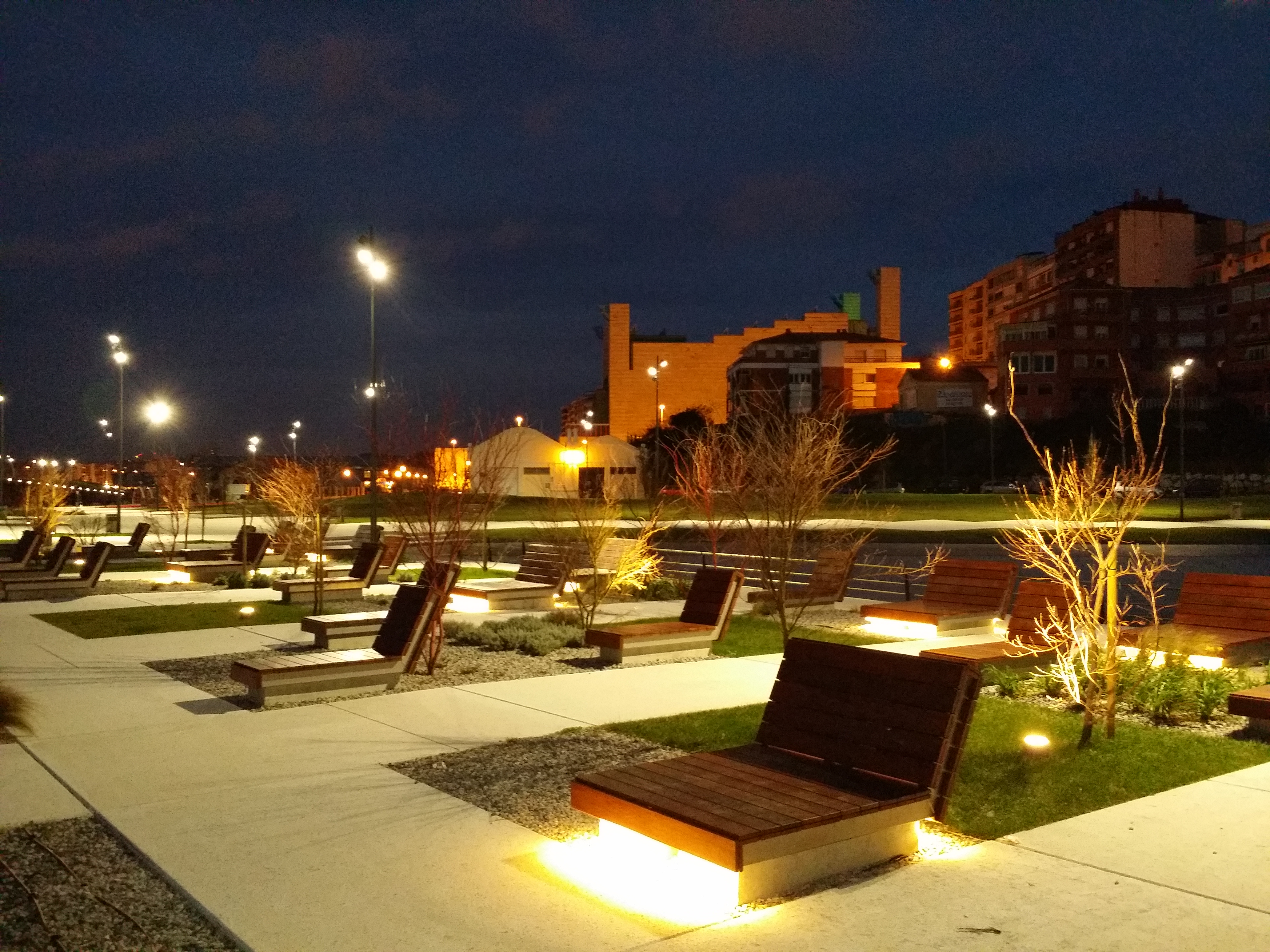 PARQUE MUELLE SAN MARTIN. SANTANDER. CANTABRIA. SPAIN. EUROPE